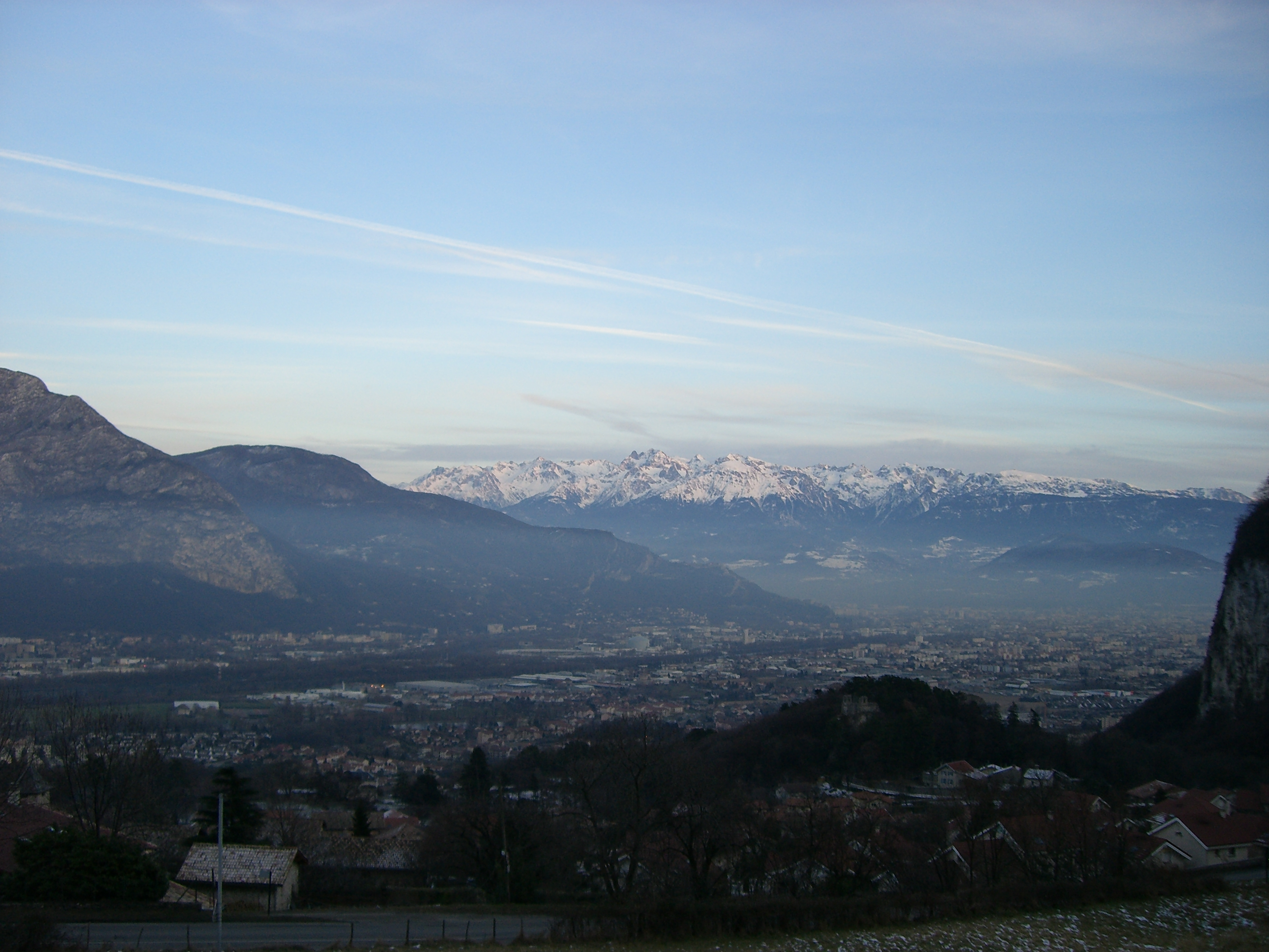 La commune de Sassenage - Vue de la Route du Pont Charvet.